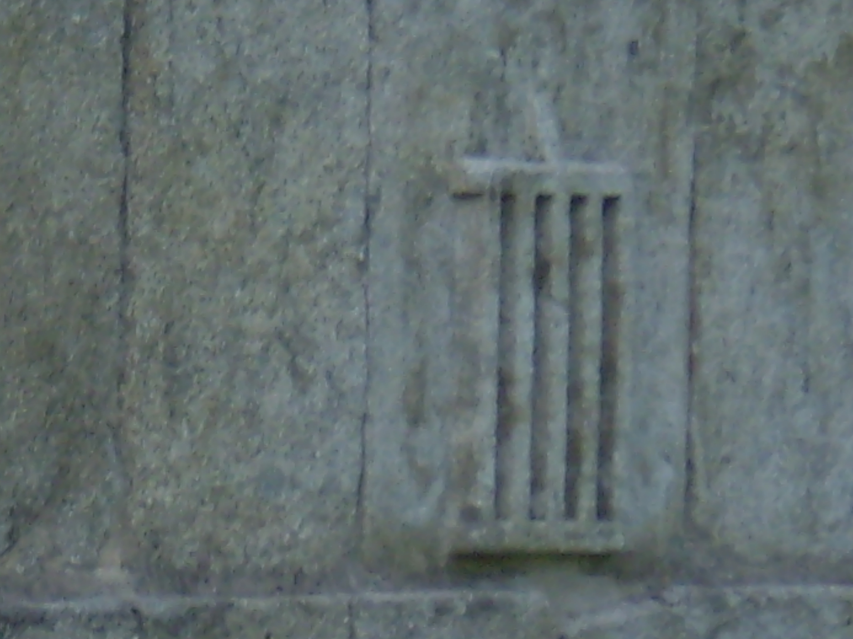 Puente Nuevo, Galapagar, Madrid, Spain. Detail